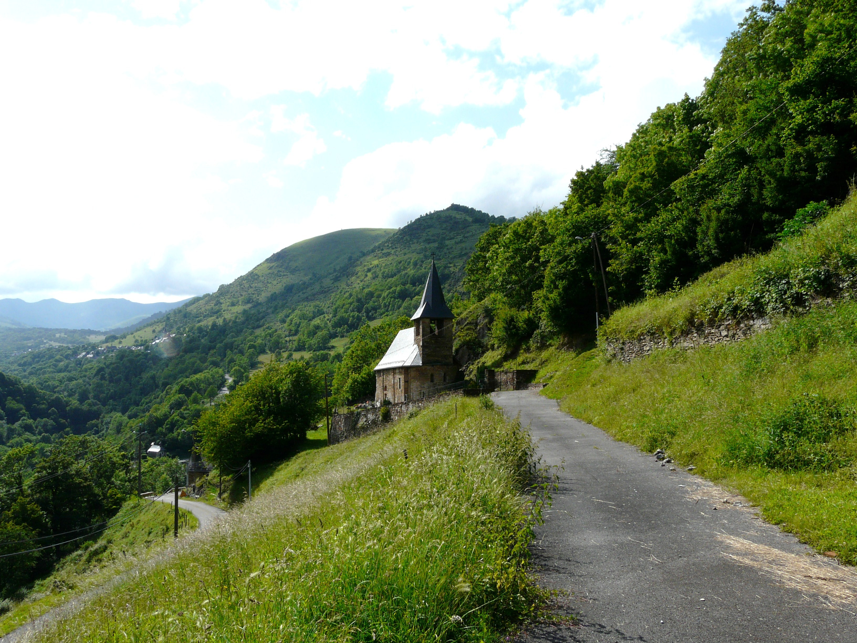 L'église Saint-Julien vue depuis le sud-est, Trébons-de-Luchon, Haute-Garonne, France.